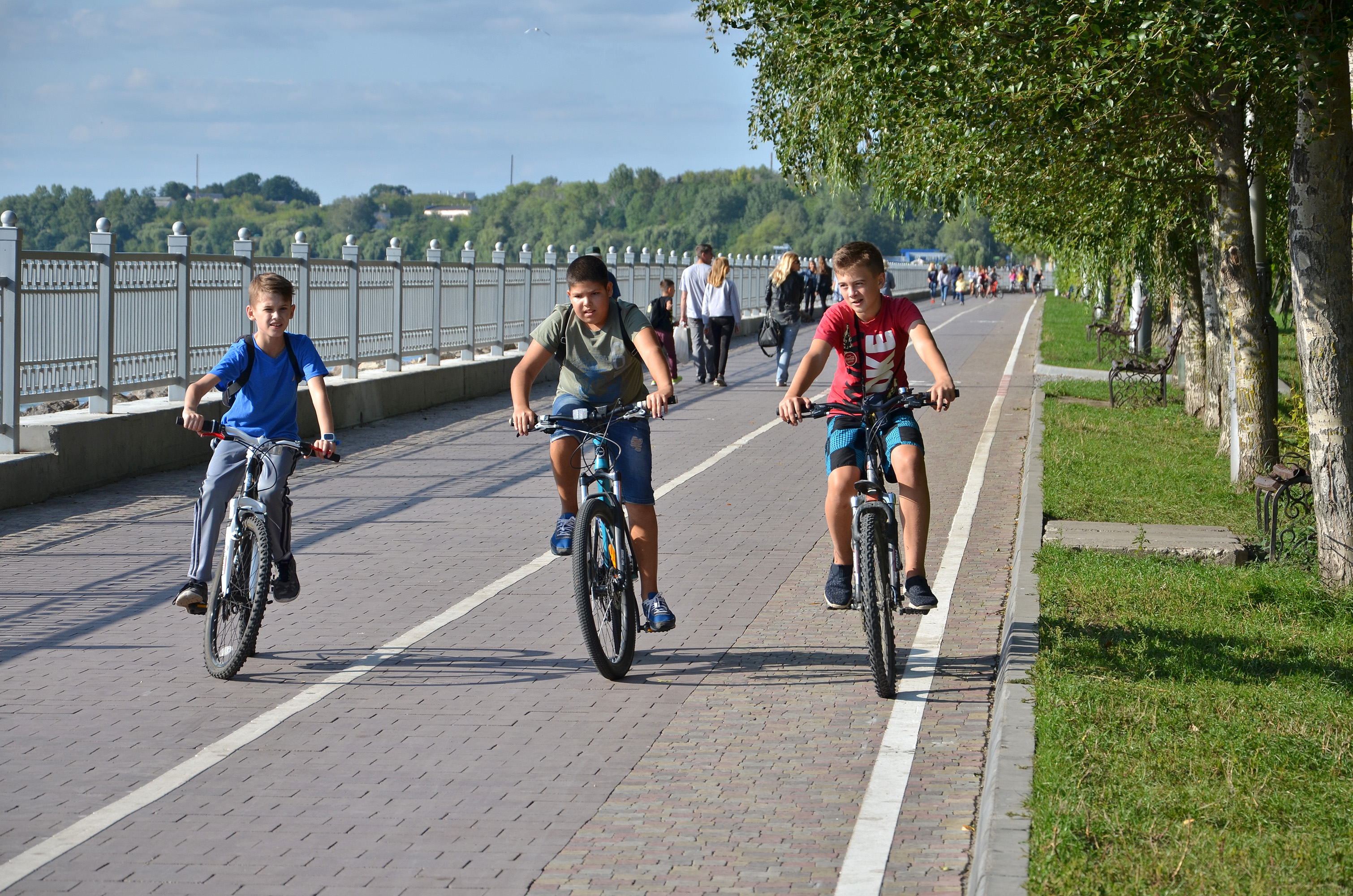 Тернопільські велосипедисти на велодоріжці в парку імені Тараса Шевченка.